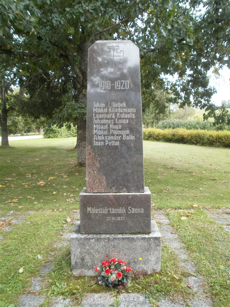 Sänna mõisa ees asetseval platsil on kohalik Vabadussõja mälestussammas. Sänna küla, Rõuge kihelkond